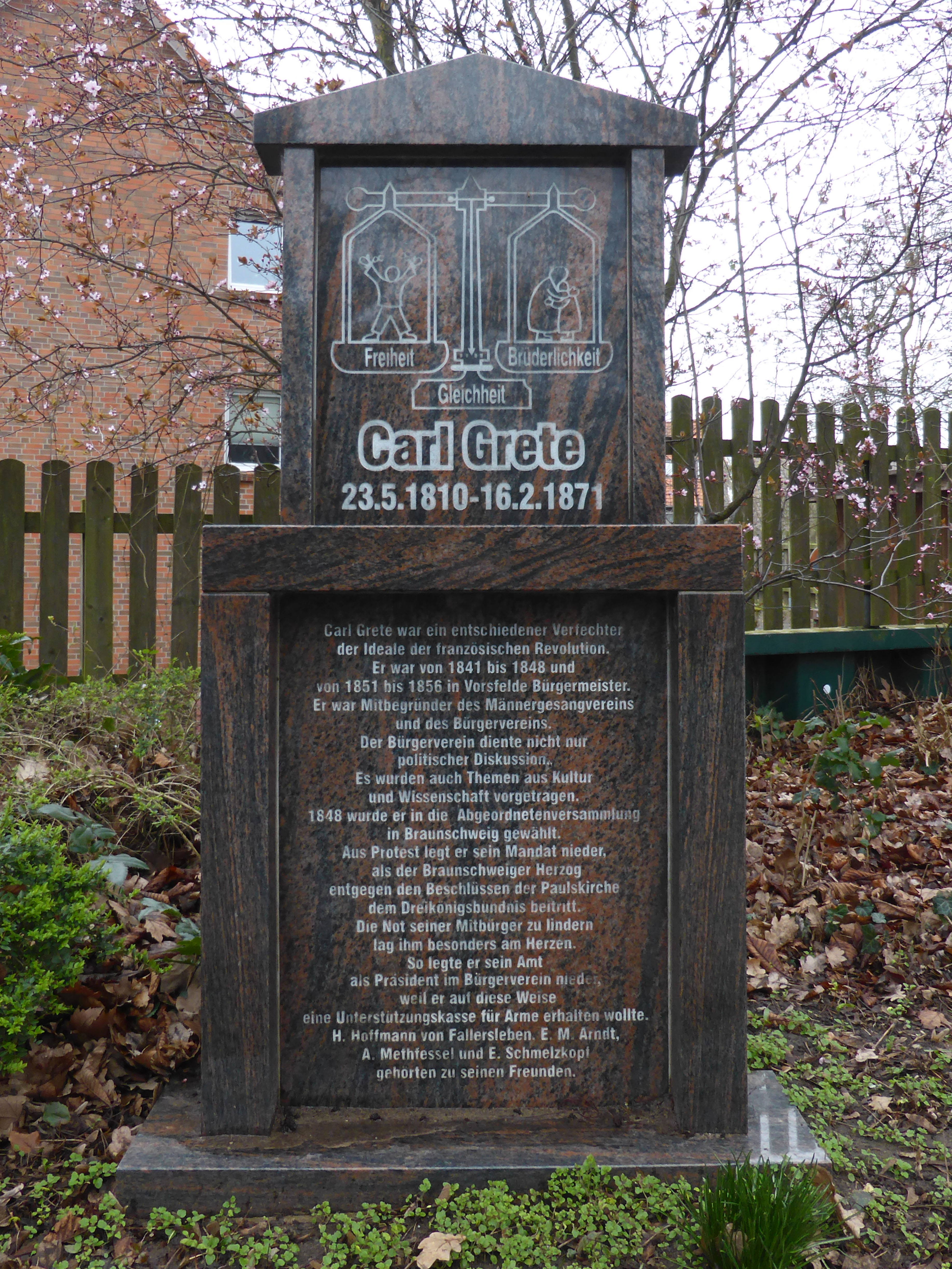 Gedenkstein an Carl Grete auf dem alten Friedhof in Vorsfelde.